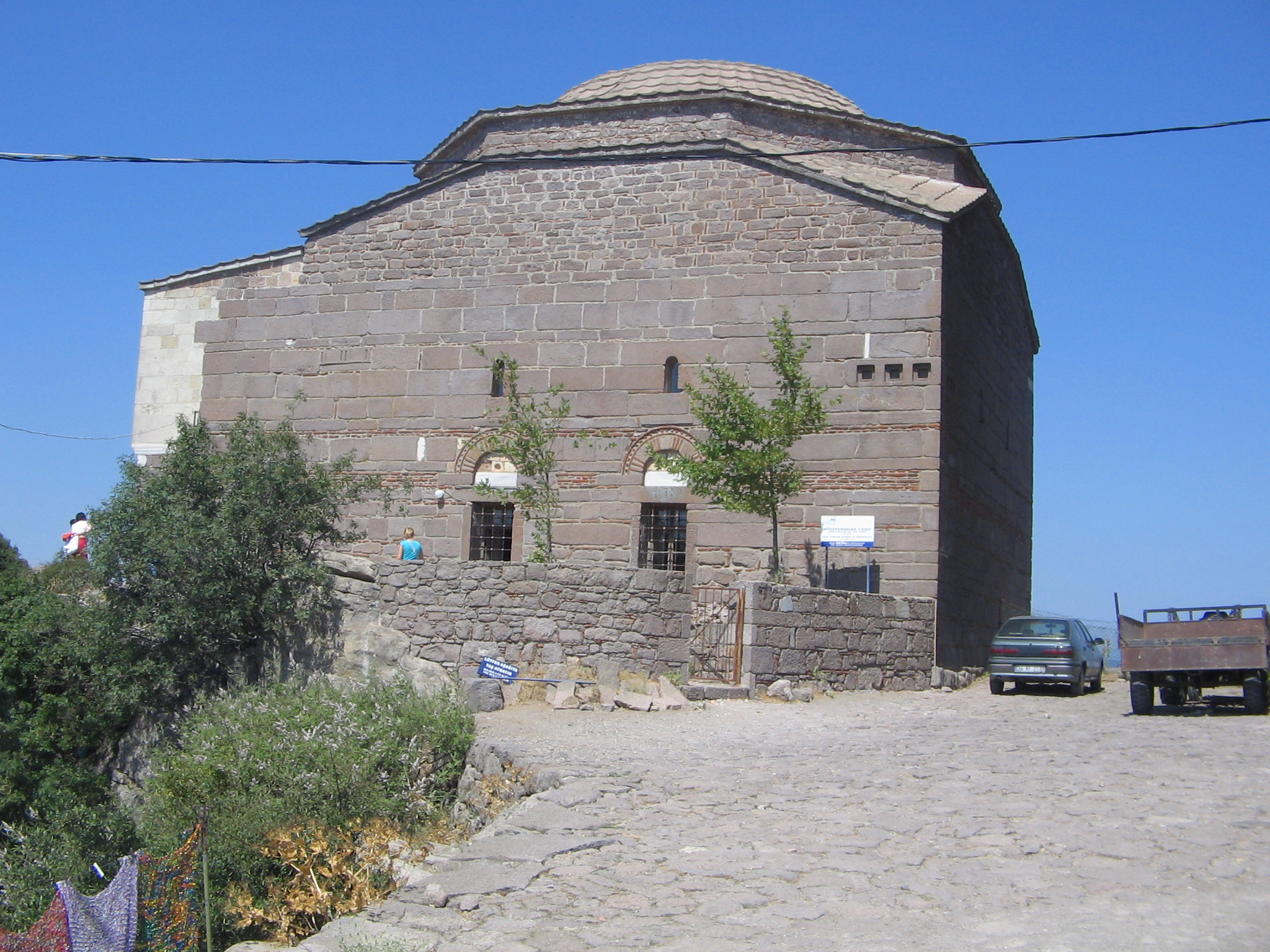 Tarihi Assos Cami